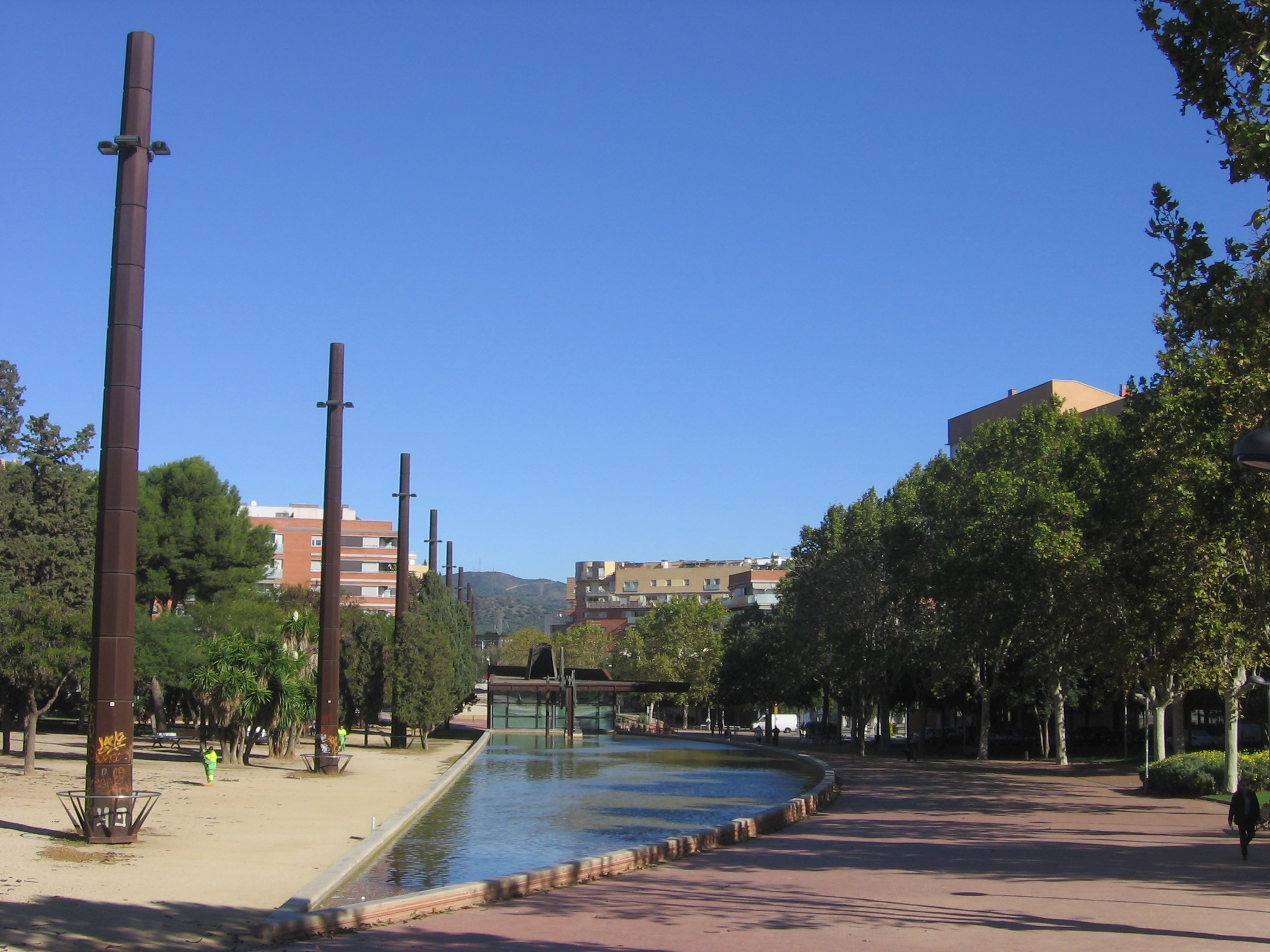 Parque de La Maquinista.